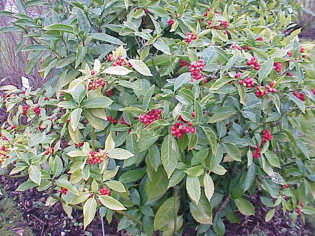 Species: Aucuba japonica Family: Cornaceae Image No. 1